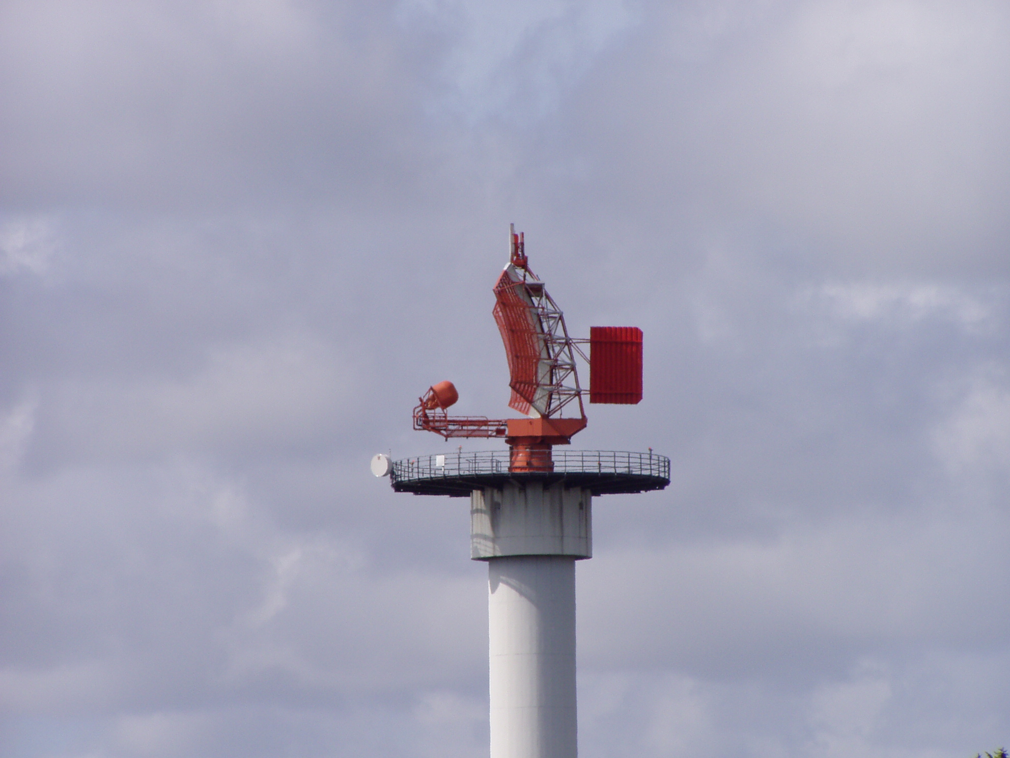 Antenne des SRE-M6 in Nordholz (bei Cuxhaven)